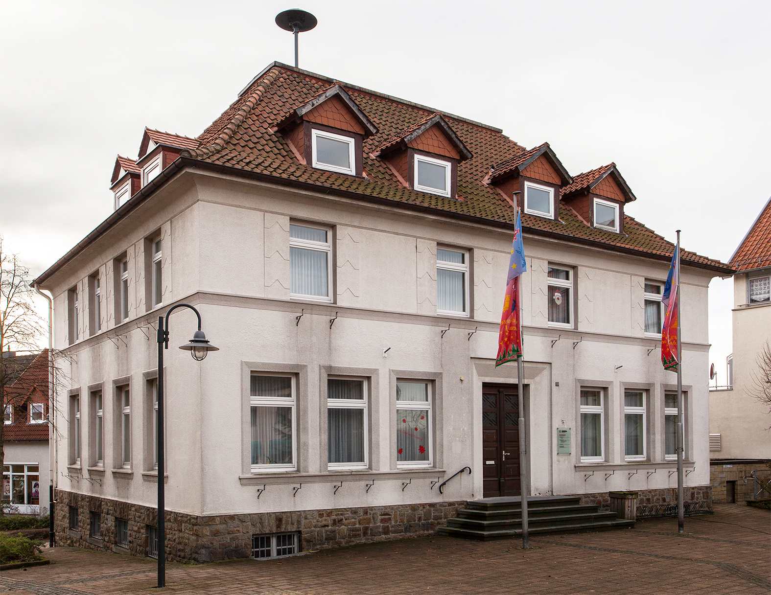 Rathaus in Bösingfeld (Extertal), Mittelstr. 33 This is a photograph of an architectural monument.